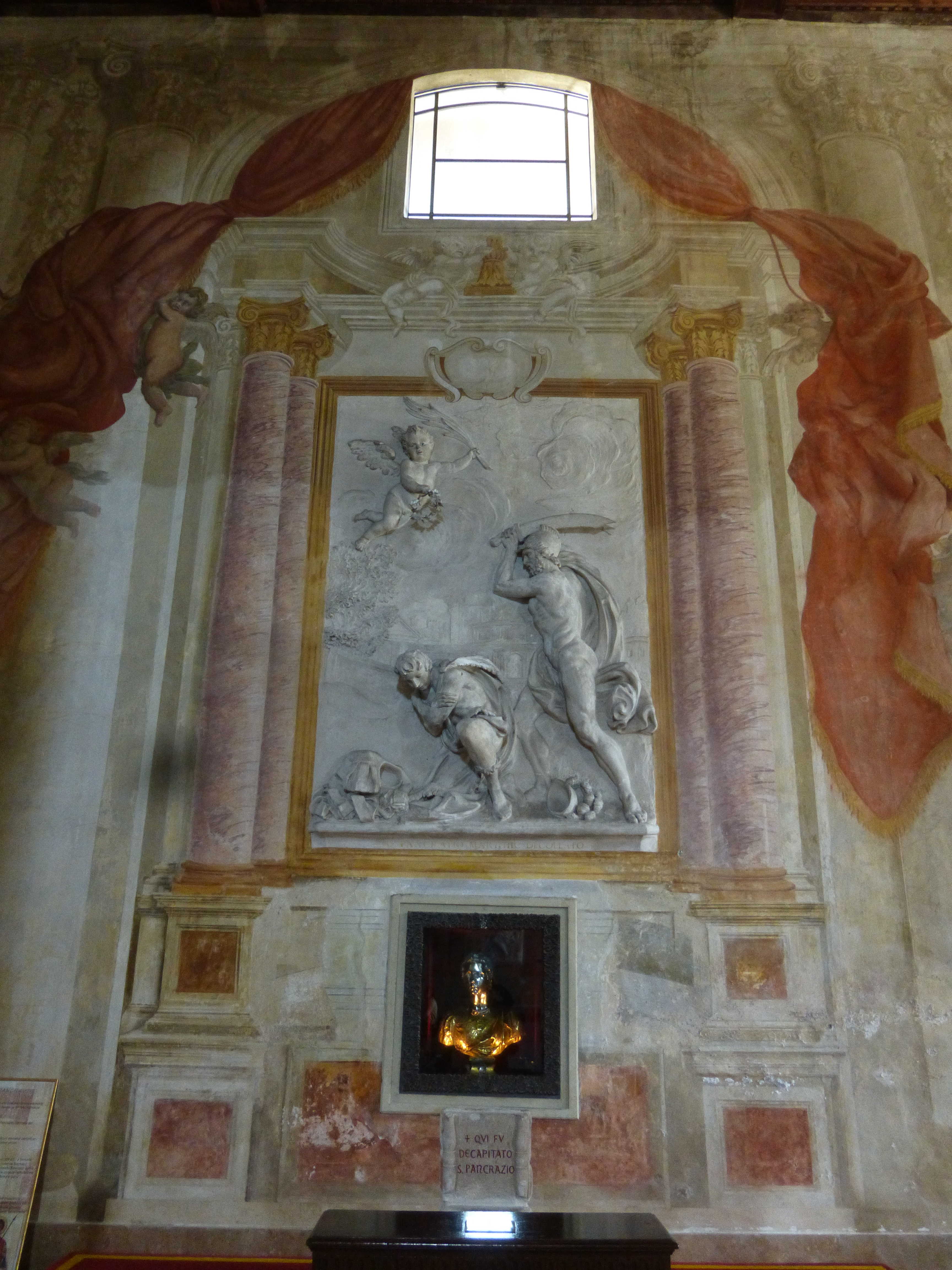 Roma, basilica s. Pancrazio. Memoriale del luogo di martirio di Pancrazio.